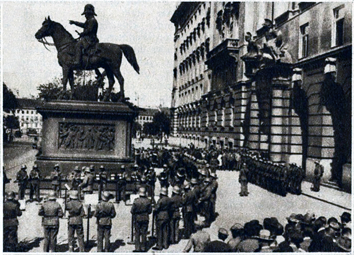 Regierungsgebäude, ehemaliges k.u.k. Kriegsministerium, Wien, I., Stubenring 1